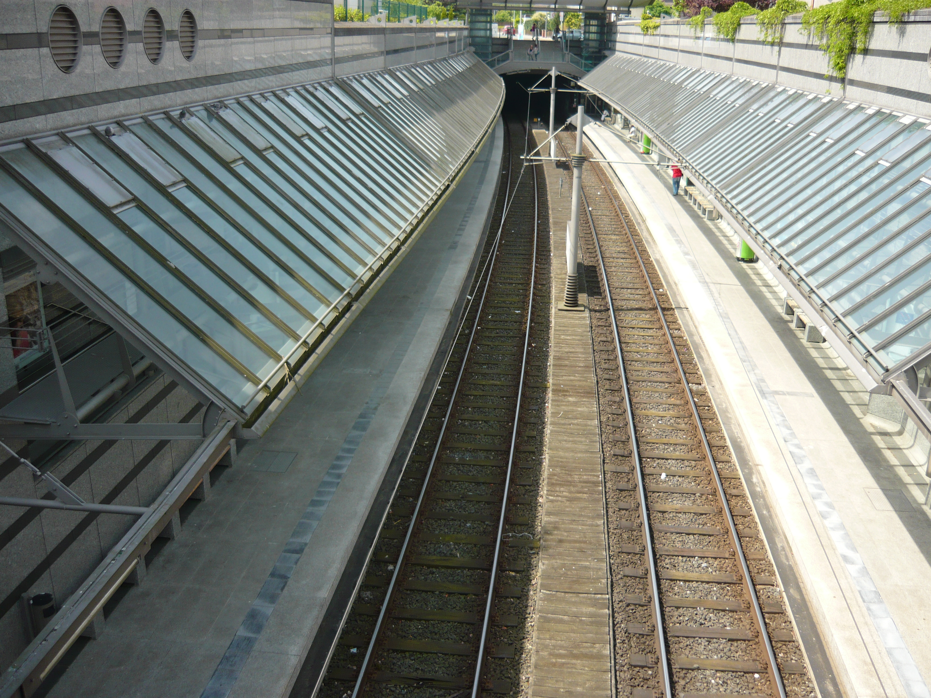 Blick in die Haltestelle Brabeckstraße,Hannover- Bemerode